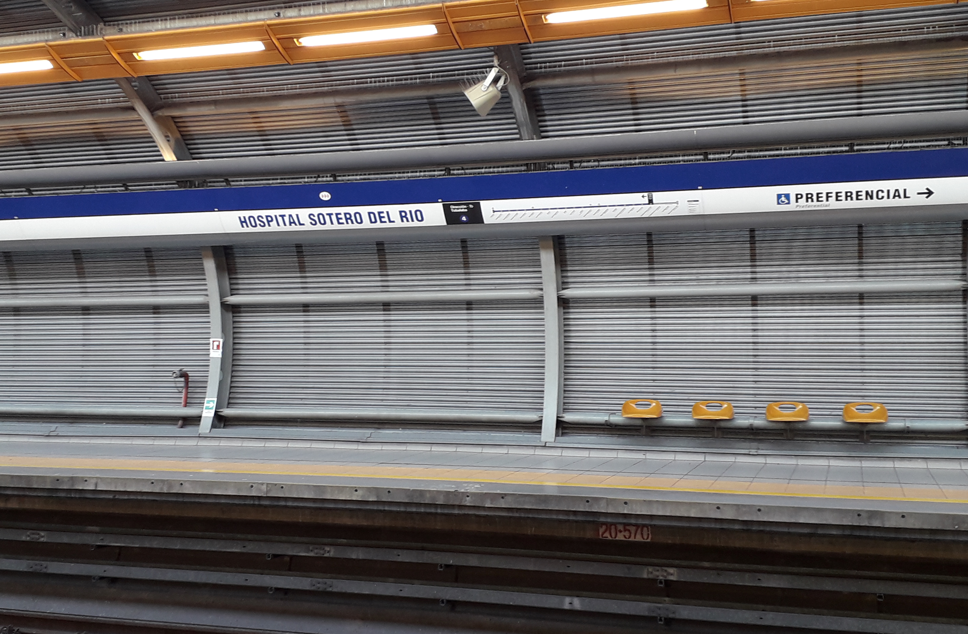 Estación Hospital Sótero del Río de la Línea 4 del Metro de Santiago.